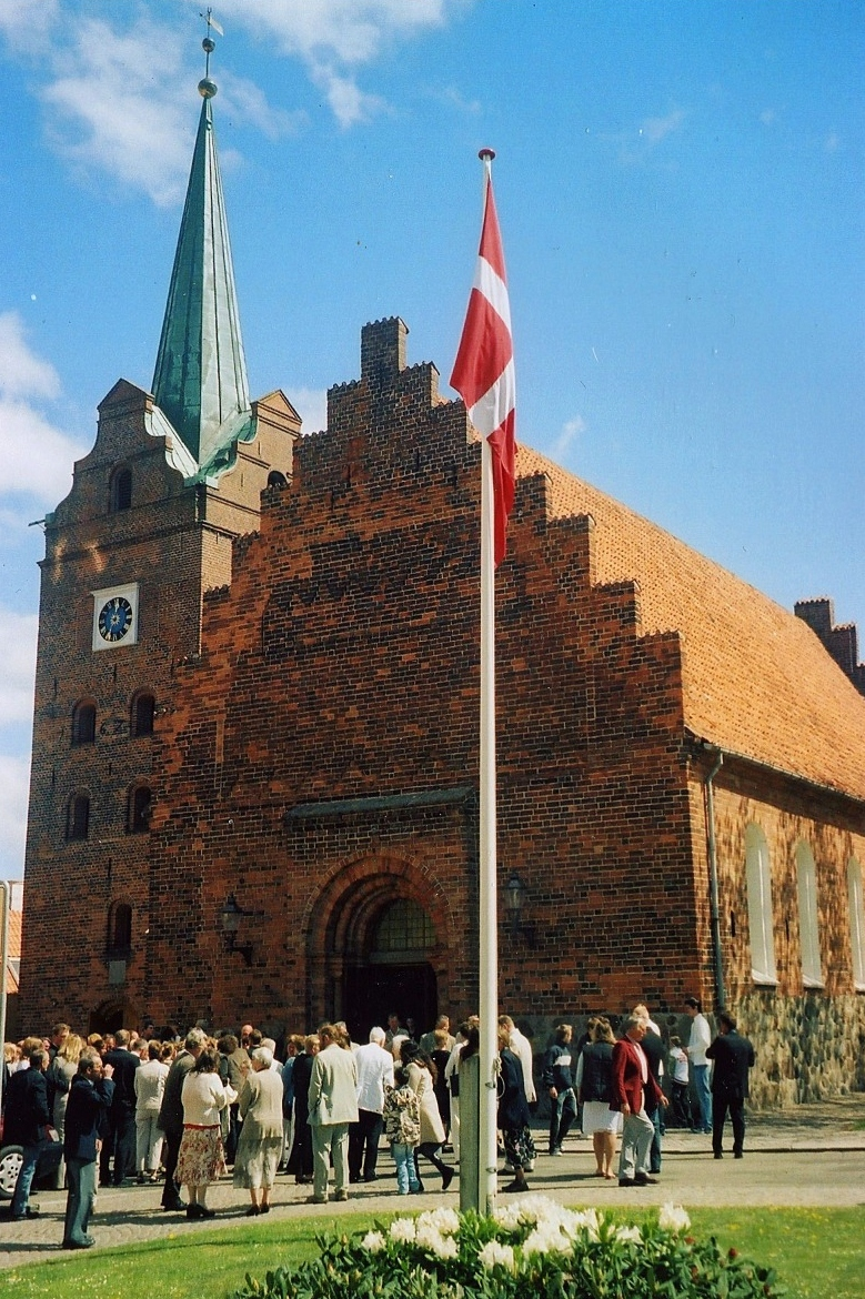 Rudkøbing Kirke, Rudkøbing Sogn, Langeland Kommune.